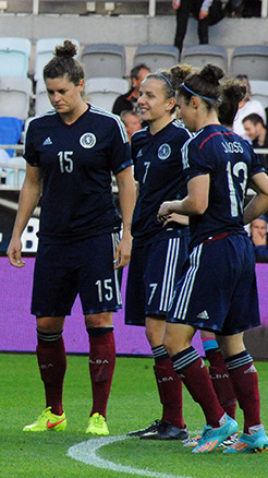 a_10_1619